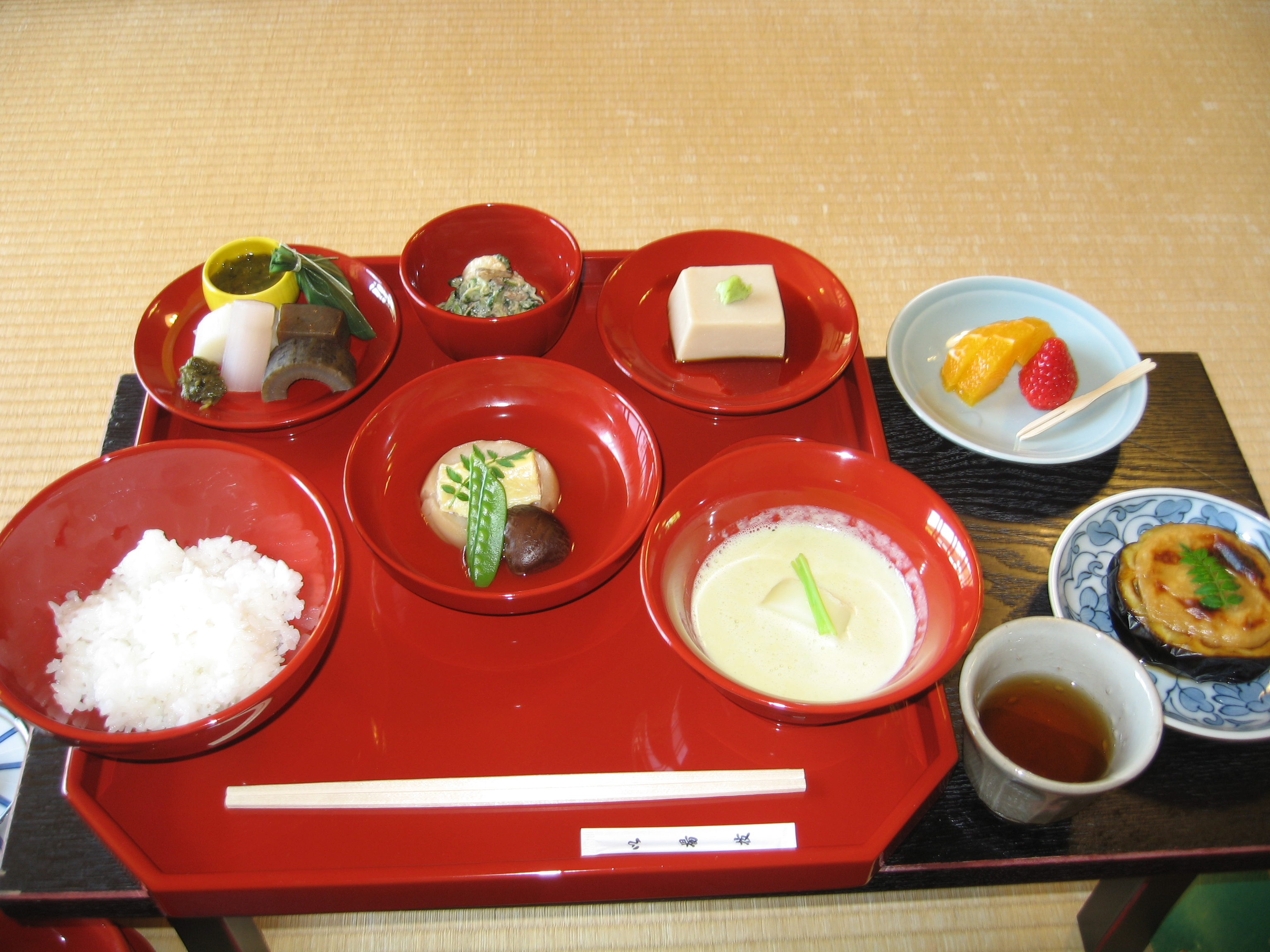 日本の春の精進料理